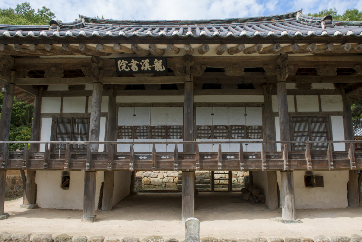 경상북도 유형문화재 제55호 용계서원 (龍溪書院)